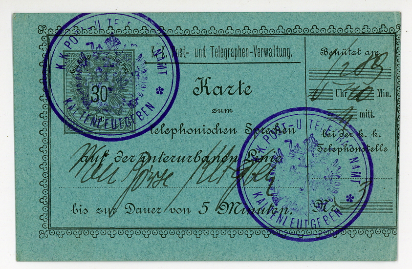 30 kreuzer Telefonkarte, 1885 Ausgabe, zum telephonischen Sprechen auf der interurbanen Linie, bis zur Dauer 5 Minuten. Violett K.K.POST-U TELEGRAPHEN AMT Kaltenleutgeben (Bezirk Mödling, Wien) Absempelungen.